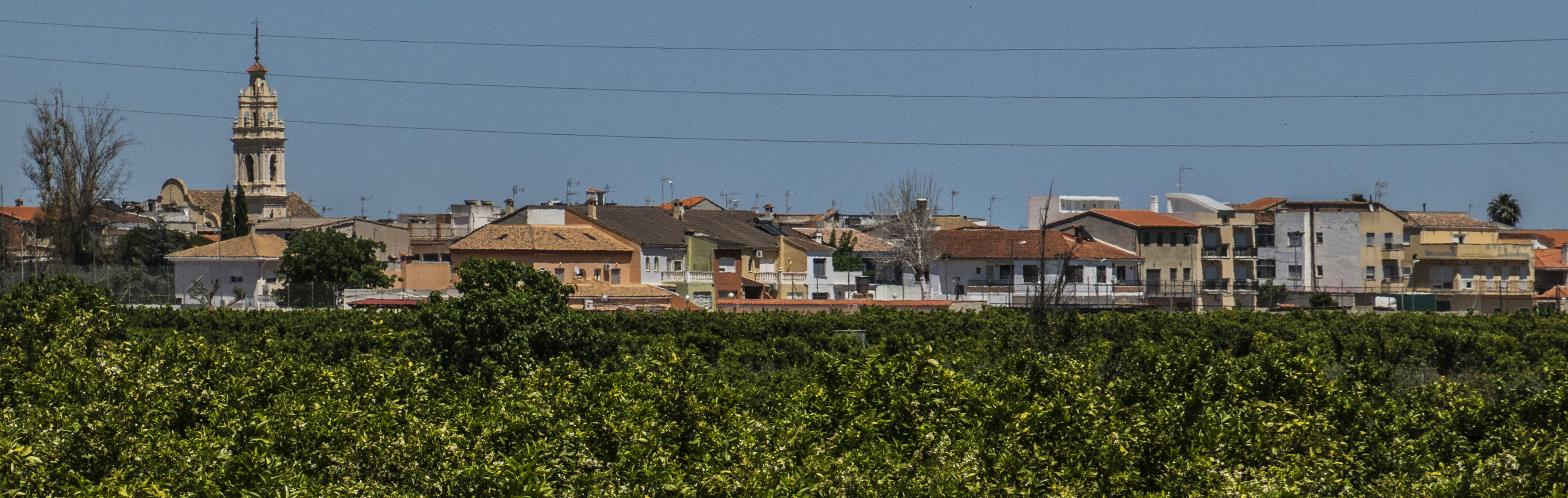 Castelló de la Ribera és un municipi de la Ribera Alta, del País Valencià.